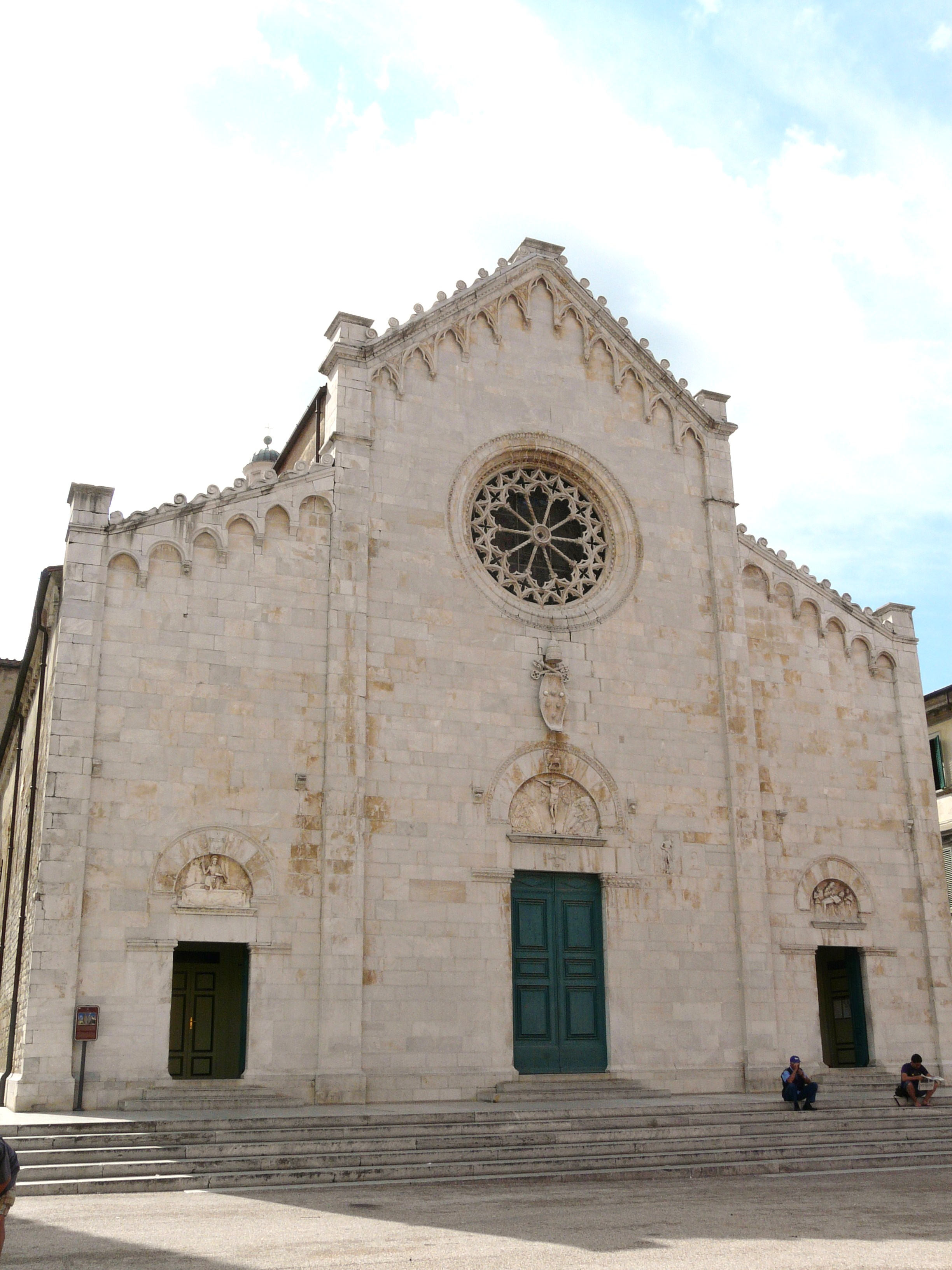 Complesso da Piazza Duomo del duomo di Pietrasanta, Toscana, Italia